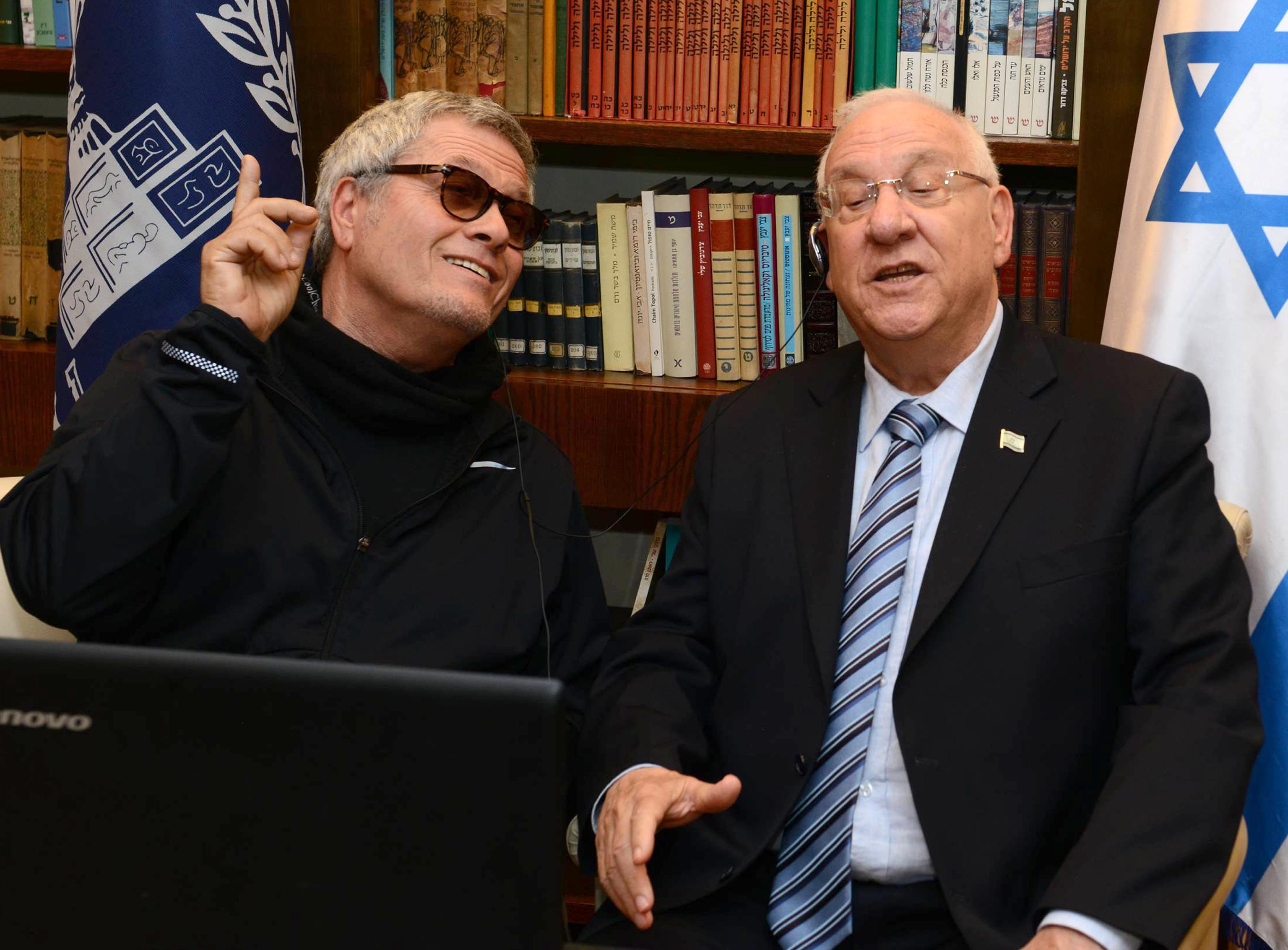 נשיא מדינת ישראל ראובן ריבלין והזמר שלמה ארצי בחתימה על ההקלטות לשיר אהבתיה לקראת יום העצמאות